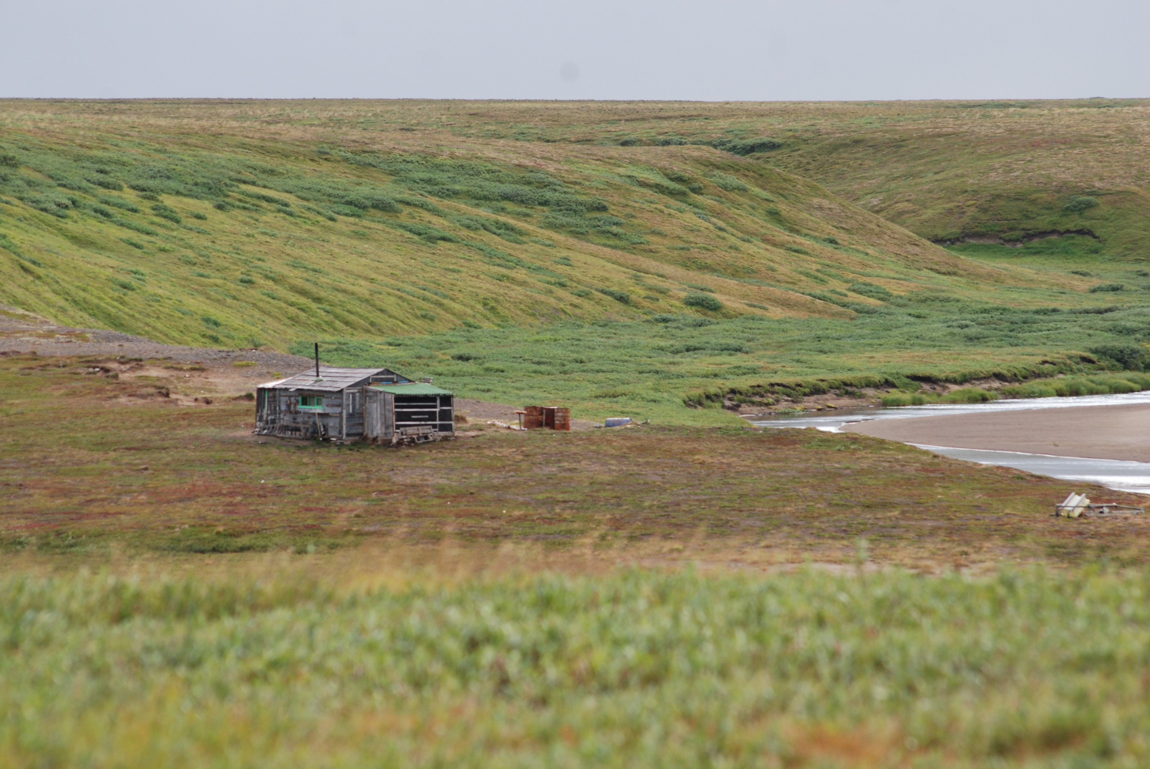 Балок на бугринке